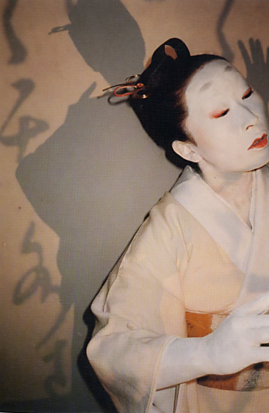 Yumi Karasumaru Performance